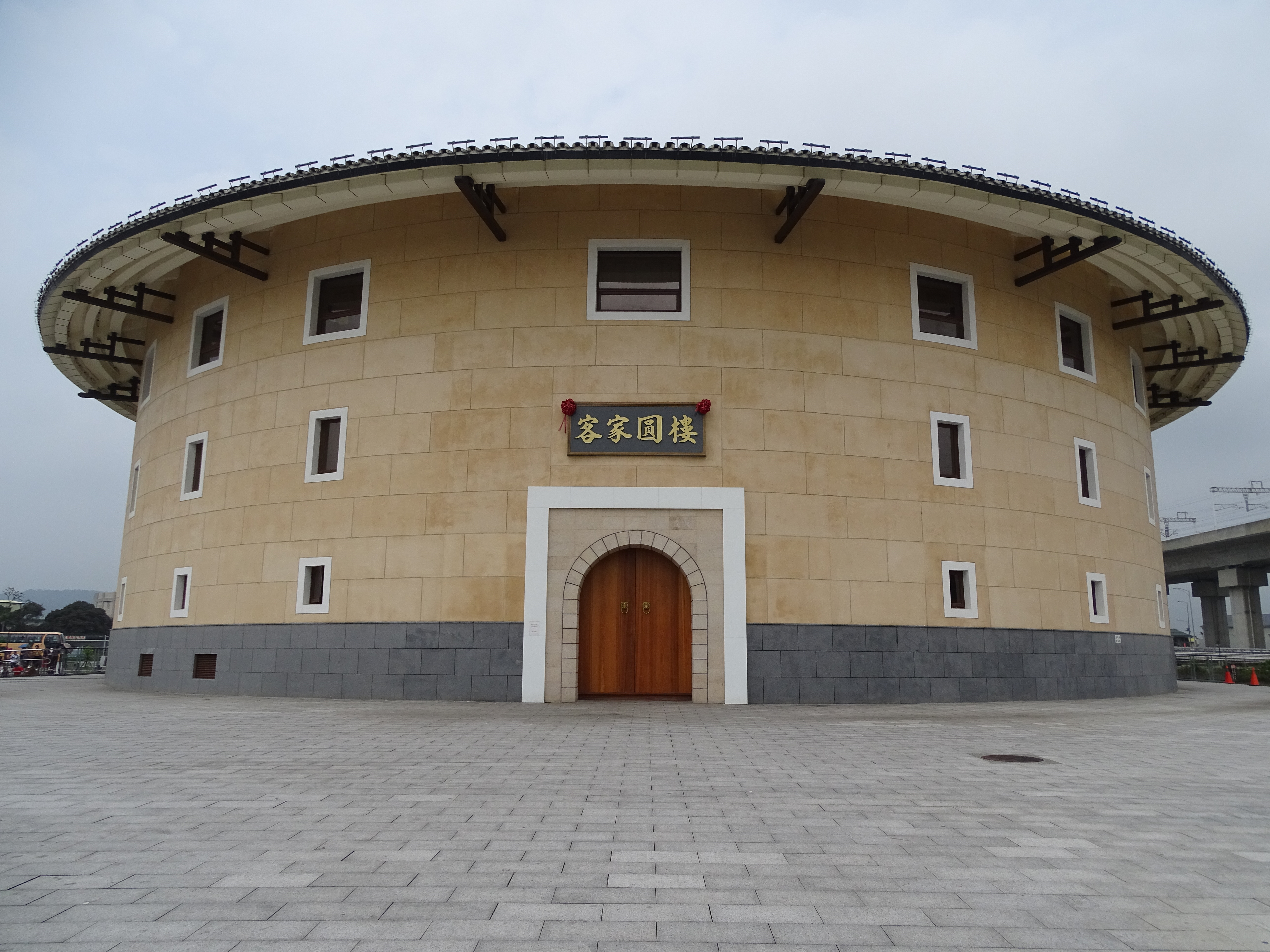 臺灣苗栗縣後龍鎮客家圓樓。